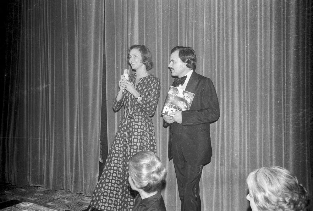 bei der Vorstellung Ihres Buches über Pelze während einer Pelzmodenschau im Hotel Maritim.